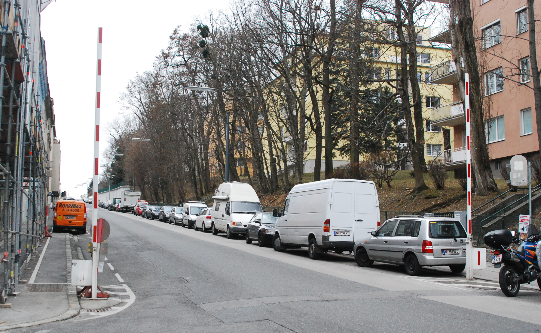 Die Schwenkgasse in Wien-Meidling ist eine Rodelstraße. Bei Schneelage kann sie mit der Schrankenanlage bei der Pohlgasse gesperrt werden, um Kindern gefahrloses Rodeln zu ermöglichen.